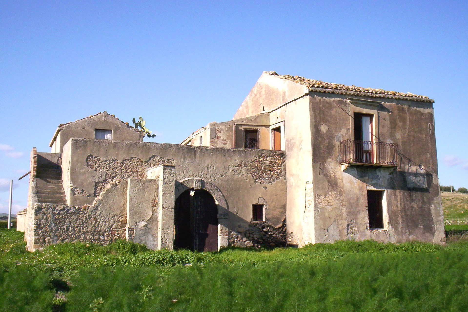 Autore e Fonte: Nicolò Fiorenza; Descrizione: Fondaco Cuba Catenanuova; Licenza d'uso